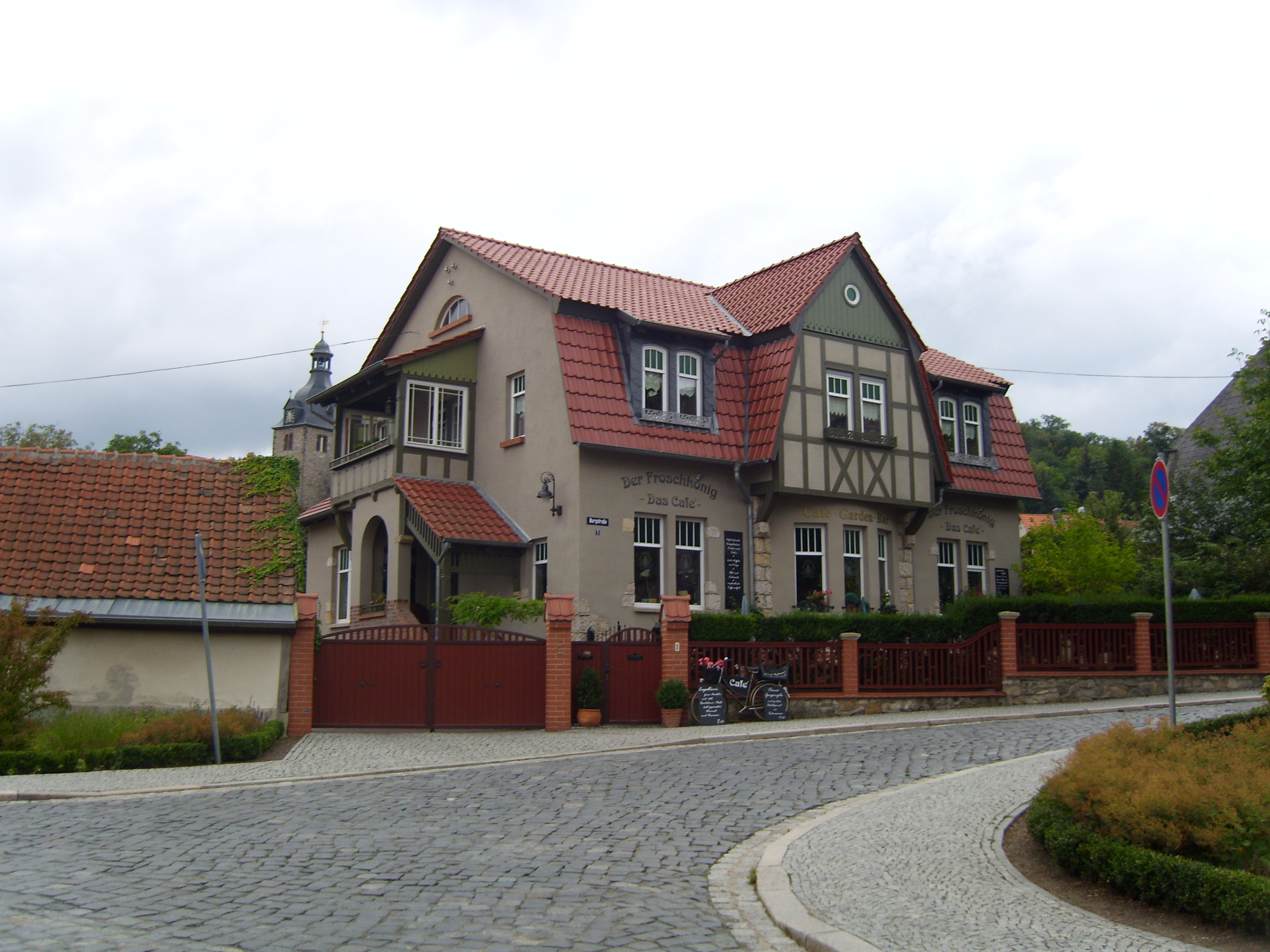 Gernrode - Stadtvilla in der Nähe der Stiftskirche